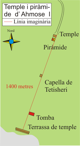 Temple d'Ahmose I, situació dels diferents elements, incloent la piràmide Imatge pròpia